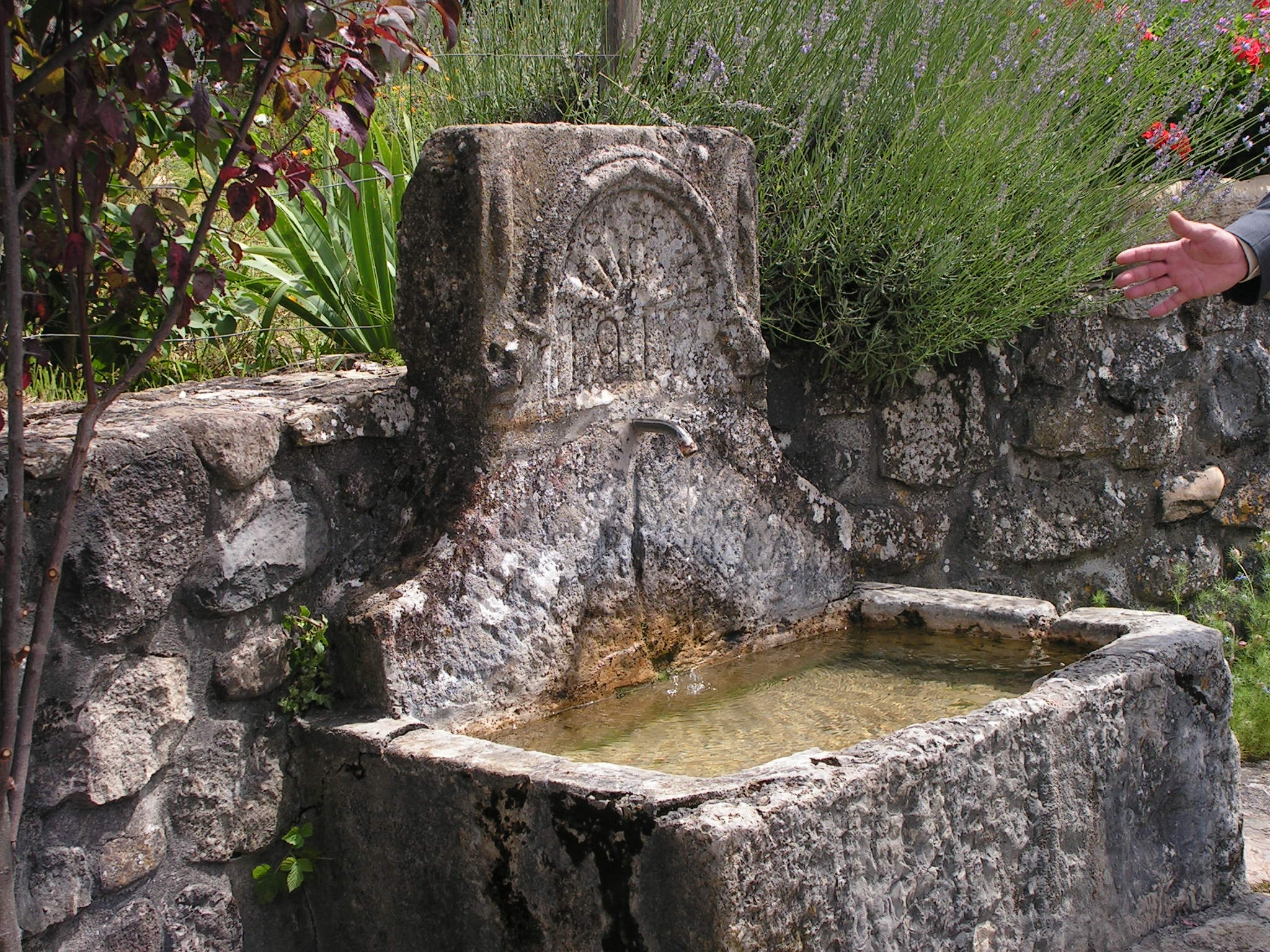 Fontaine servant à la tradition du "bacha" lors des mariages sur la commune de Coux (Ardeche - France)